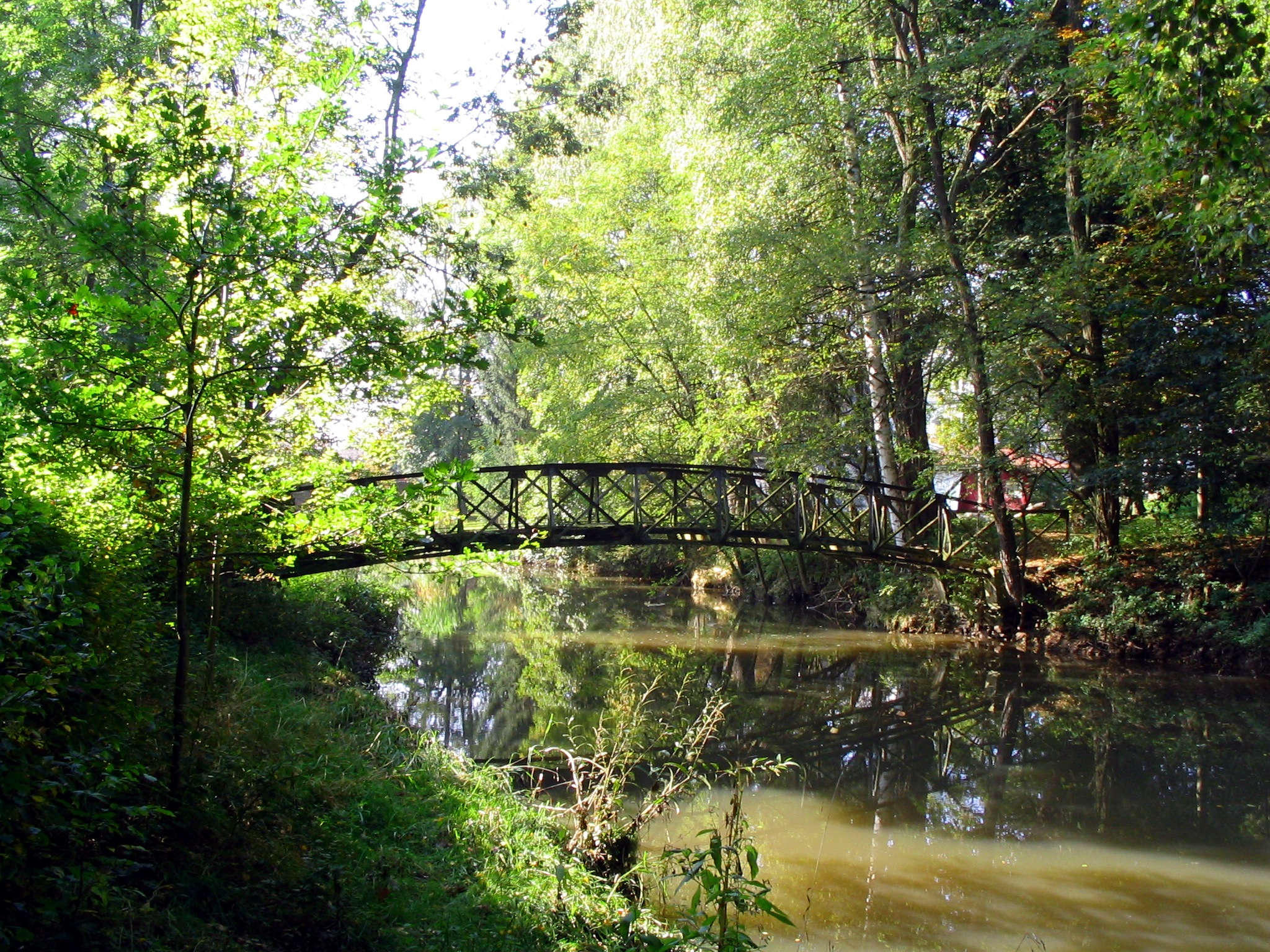 Alte Brücke über die Schwalm im Schlosspark Loshausen